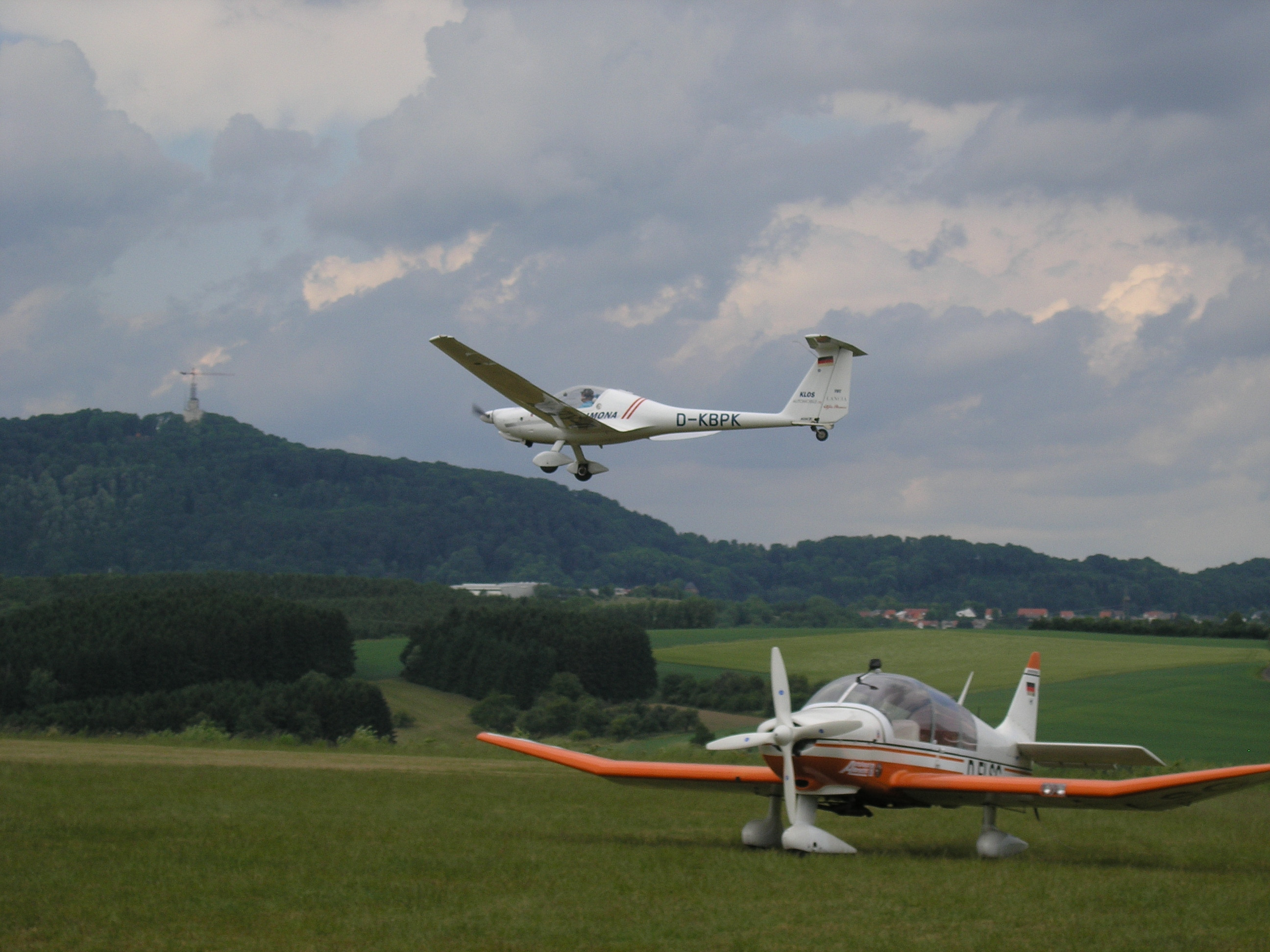 Ein "Super Dimona" Motorsegler im Endanflug auf den Segelflugplatz in Marpingen.